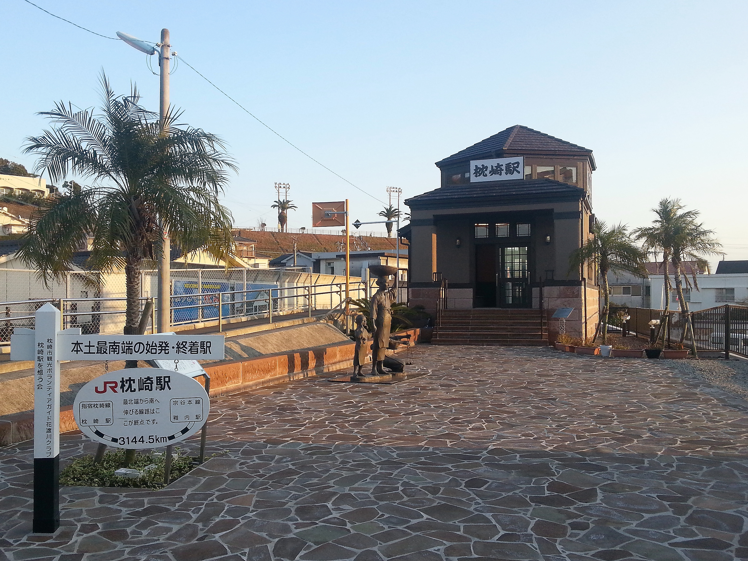 JR 枕崎駅